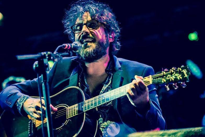 Dario Brunori cantante della Brunori Sas